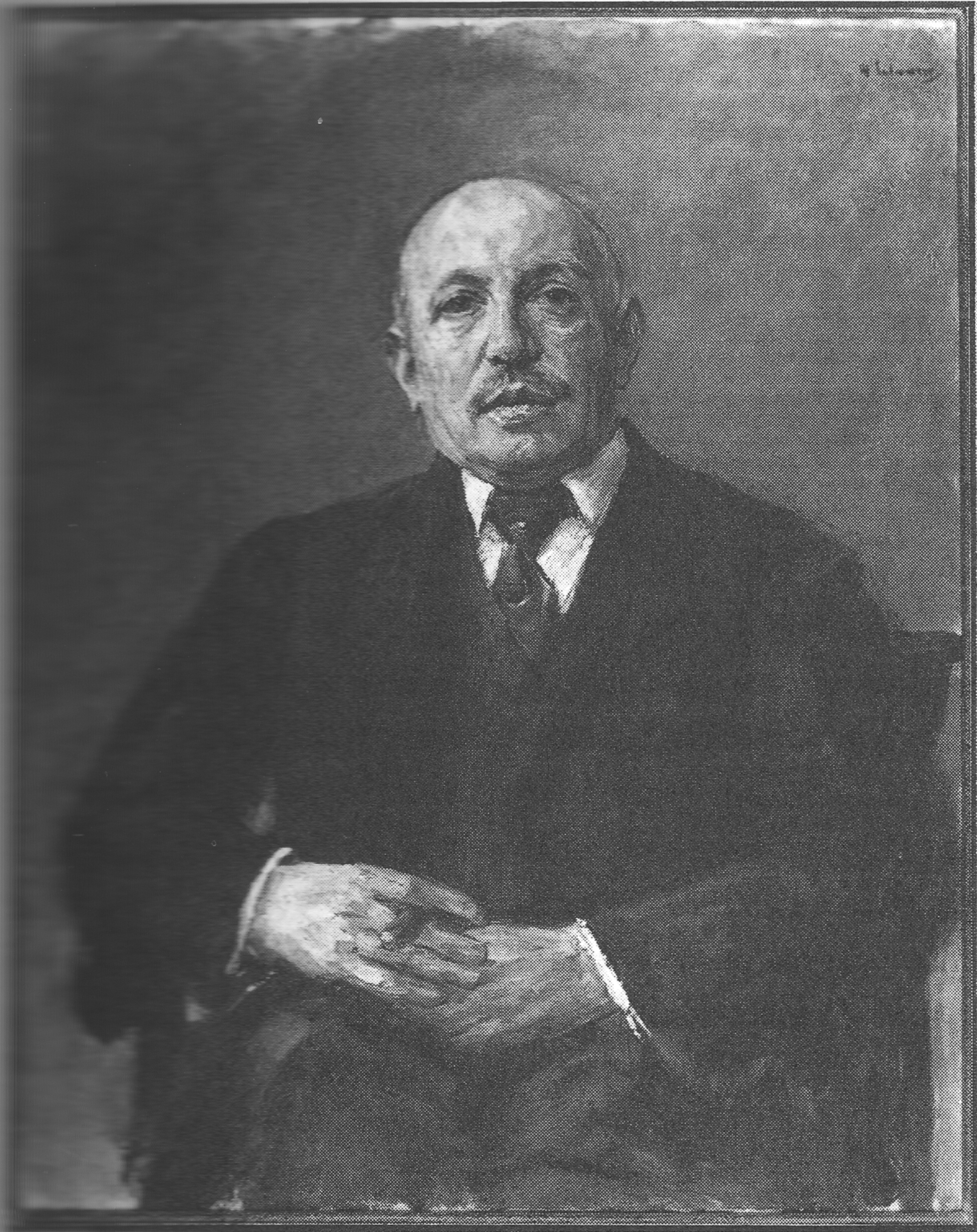 Samuel Fischer, Ölgemälde von Max Liebermann aus dem Jahre 1915